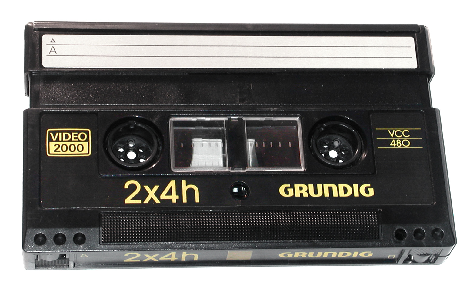 Videokassette mit Laufzeit zwei Male vier Stunden PAL Video